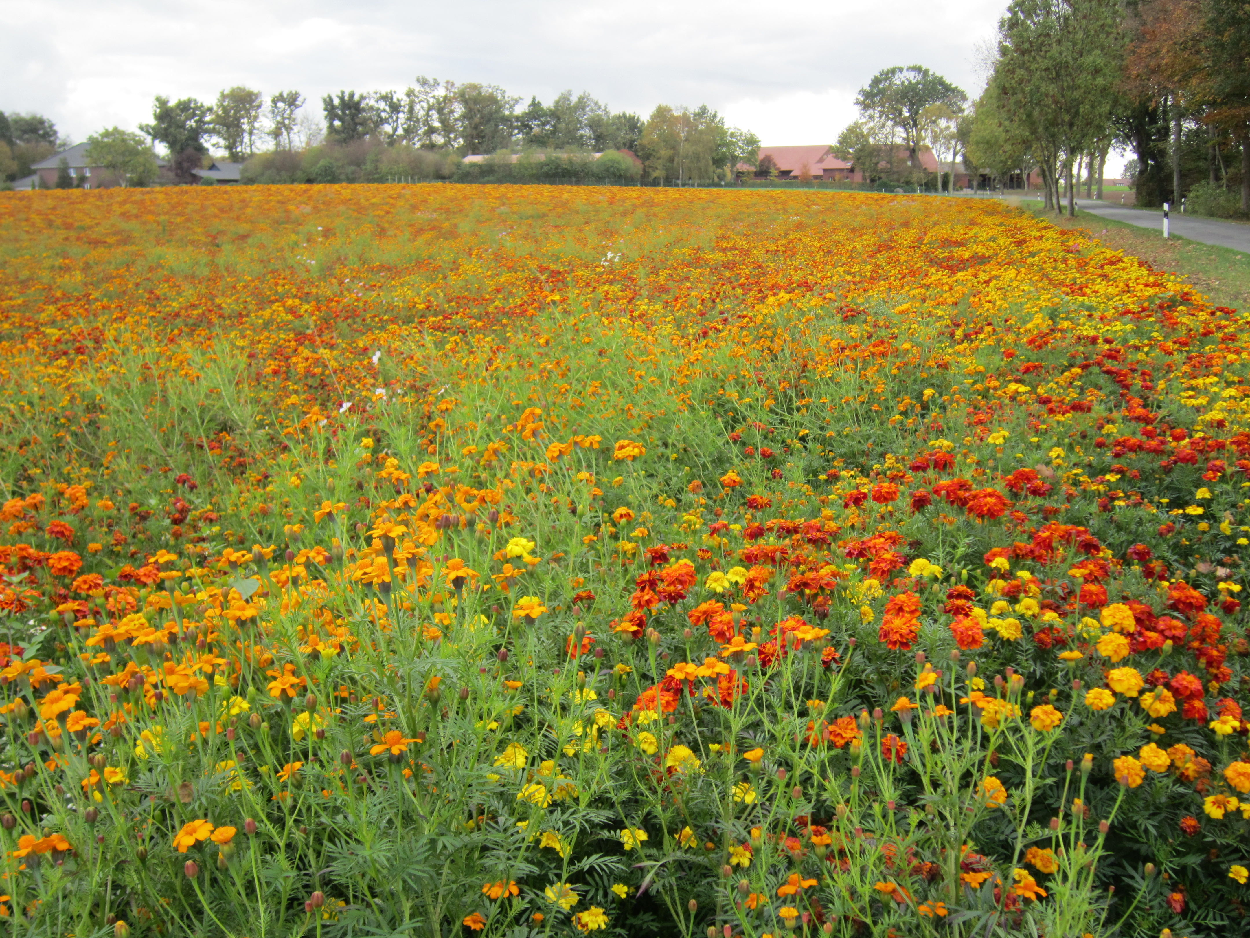 Tagetesfeld in Meyerhöfen (Gemeinde Visbek, Landkreis Vechta, Niedersachsen)